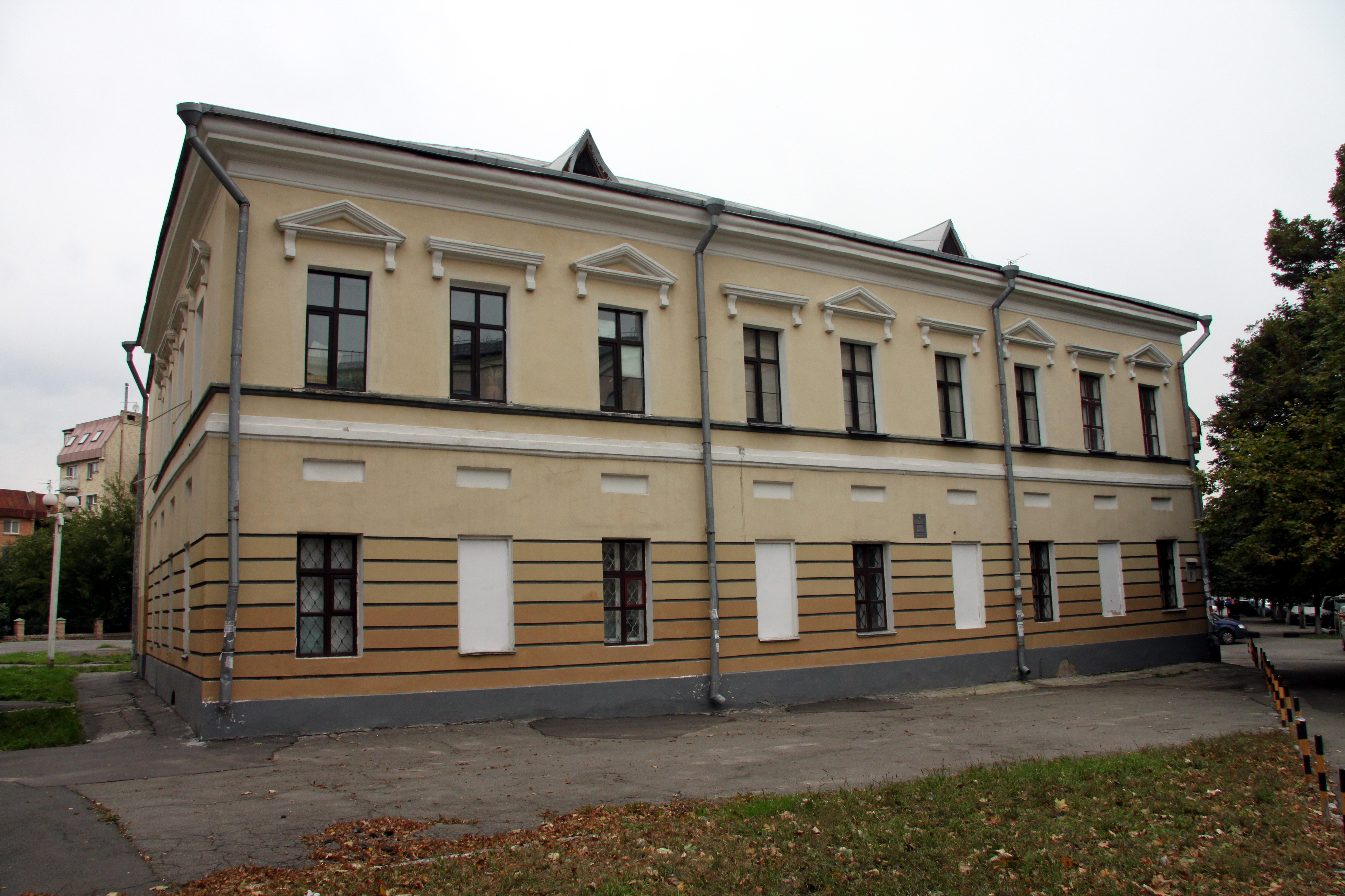 Будинок житловий київського бургомістра І. Г. Кисилевського, Київ, Сковороди Григорія вул., 9